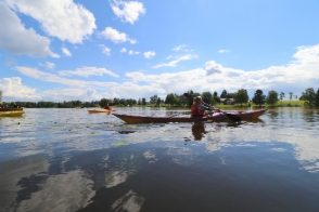 Soitajia Satakunnan kansansoudussa vuonna 2017